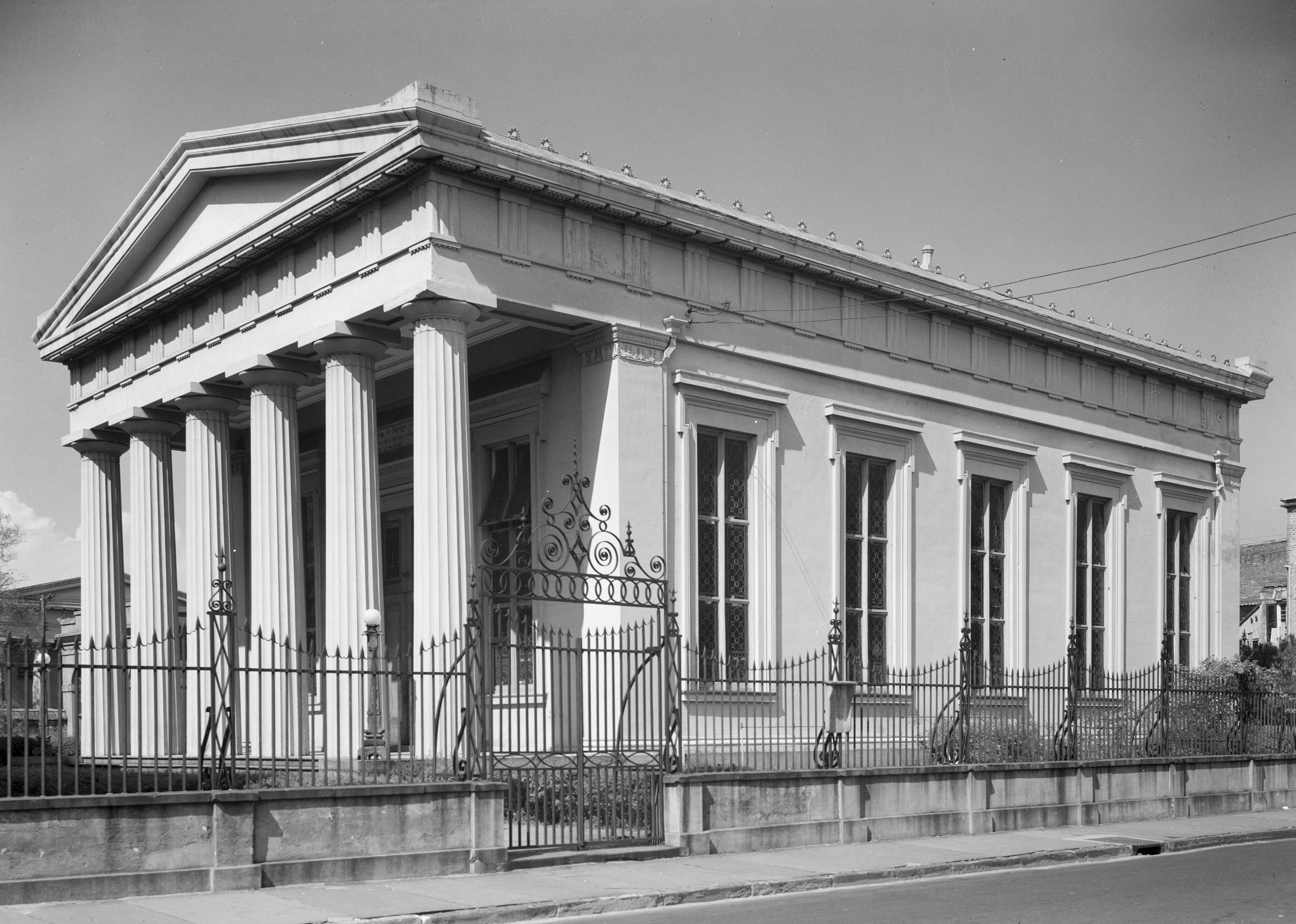 Kahal Kadosh Beth Elohim Synagogue